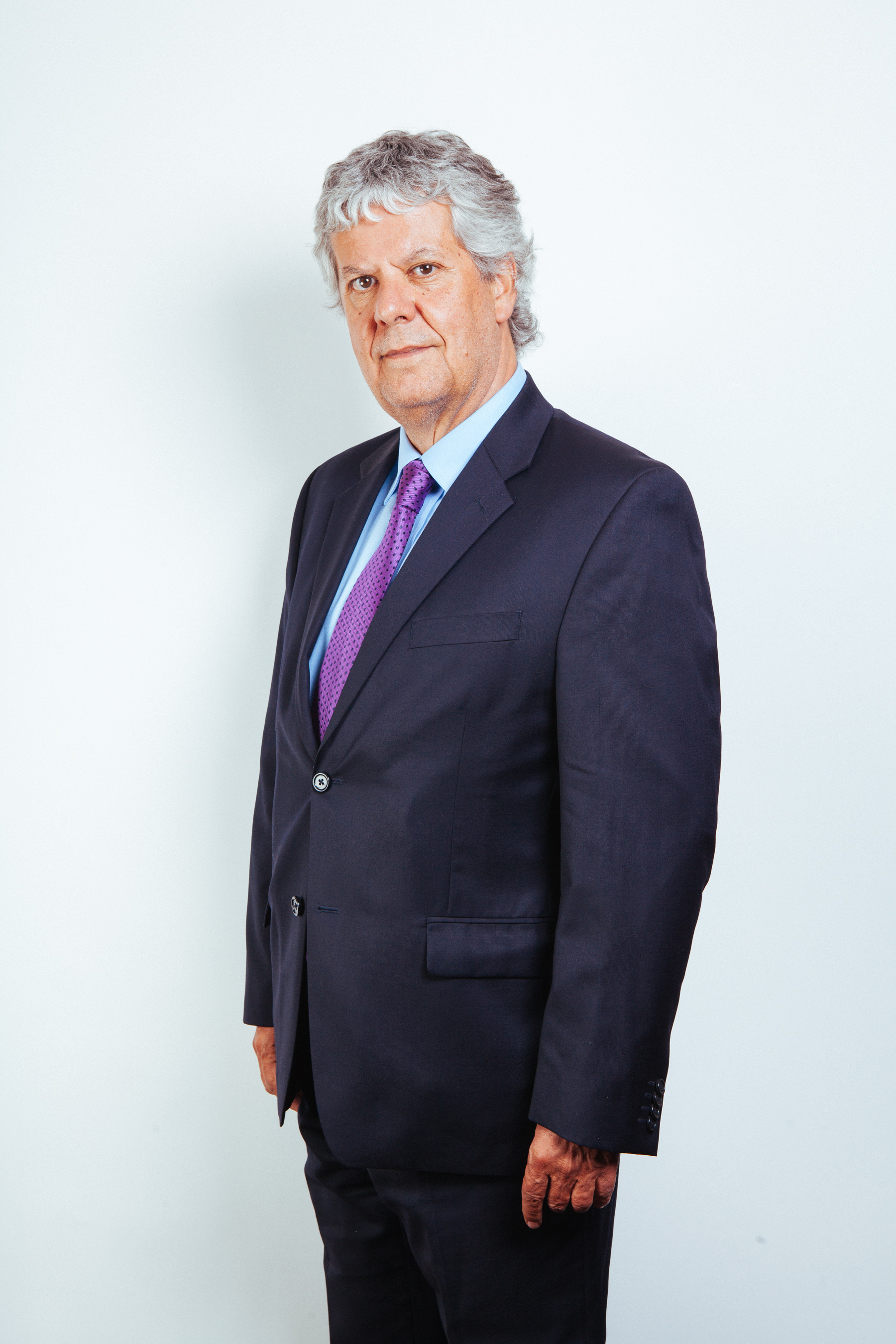 Ministro de Estado del segundo gobierno de Michelle Bachelet (2014-2018)